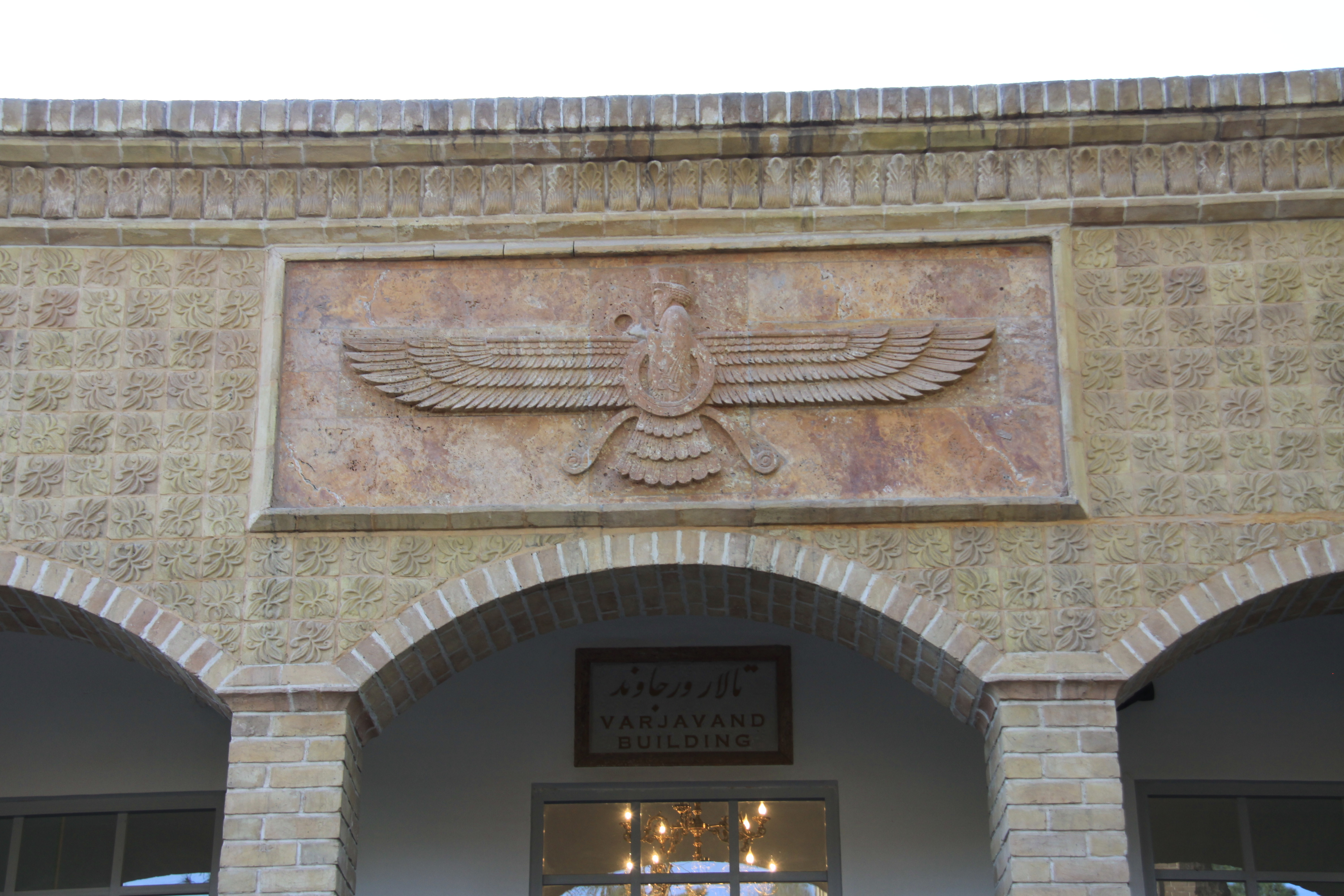 آتشکده زرتشتیان و محوطه آن